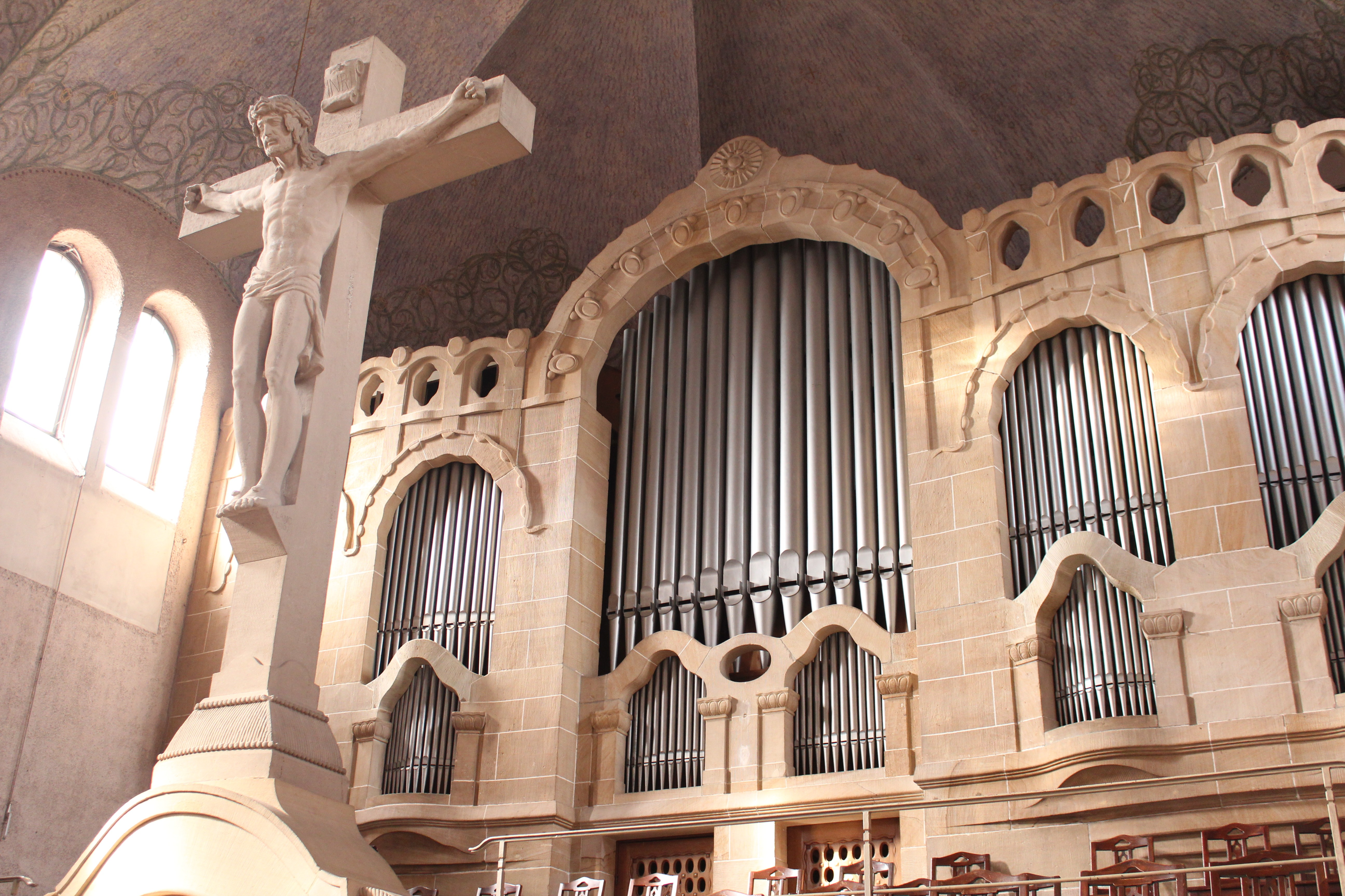 Orgel Markuskirche Stuttgart